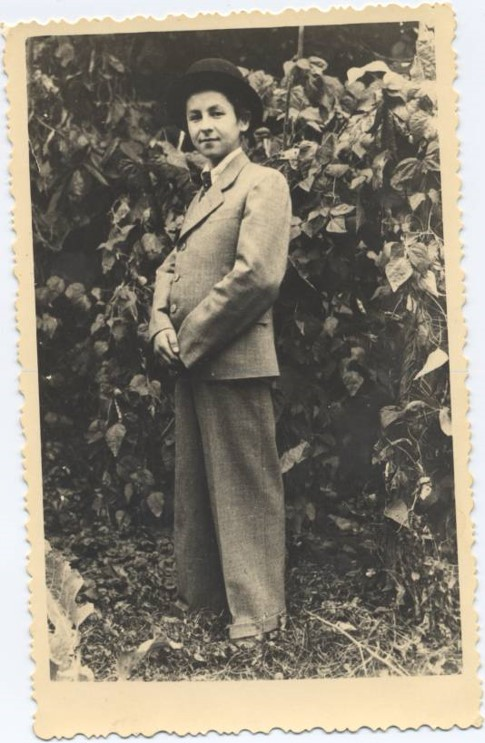 יהודי מקהילת טעטש לצד בוסתן התפוחים שלו